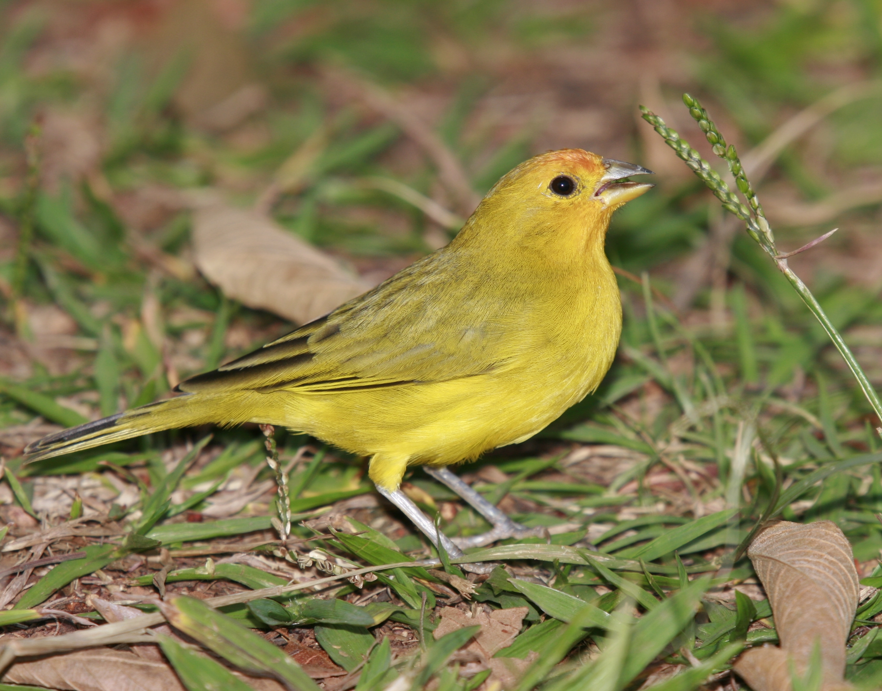 Macho / male